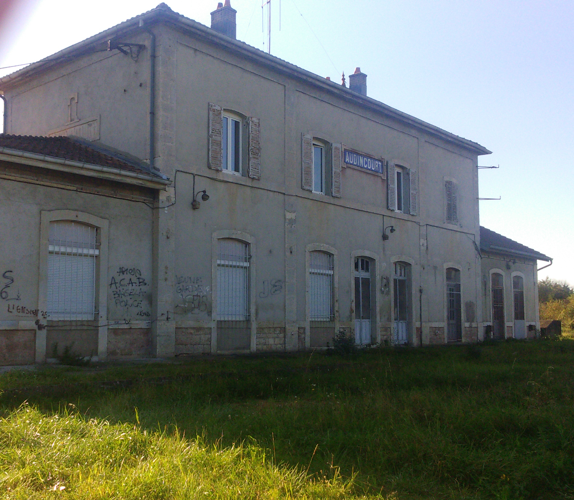 Ancienne gare d'Audincourt, Doubs, France